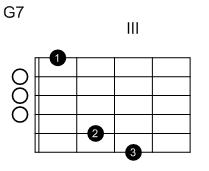 Eigenanfertigung